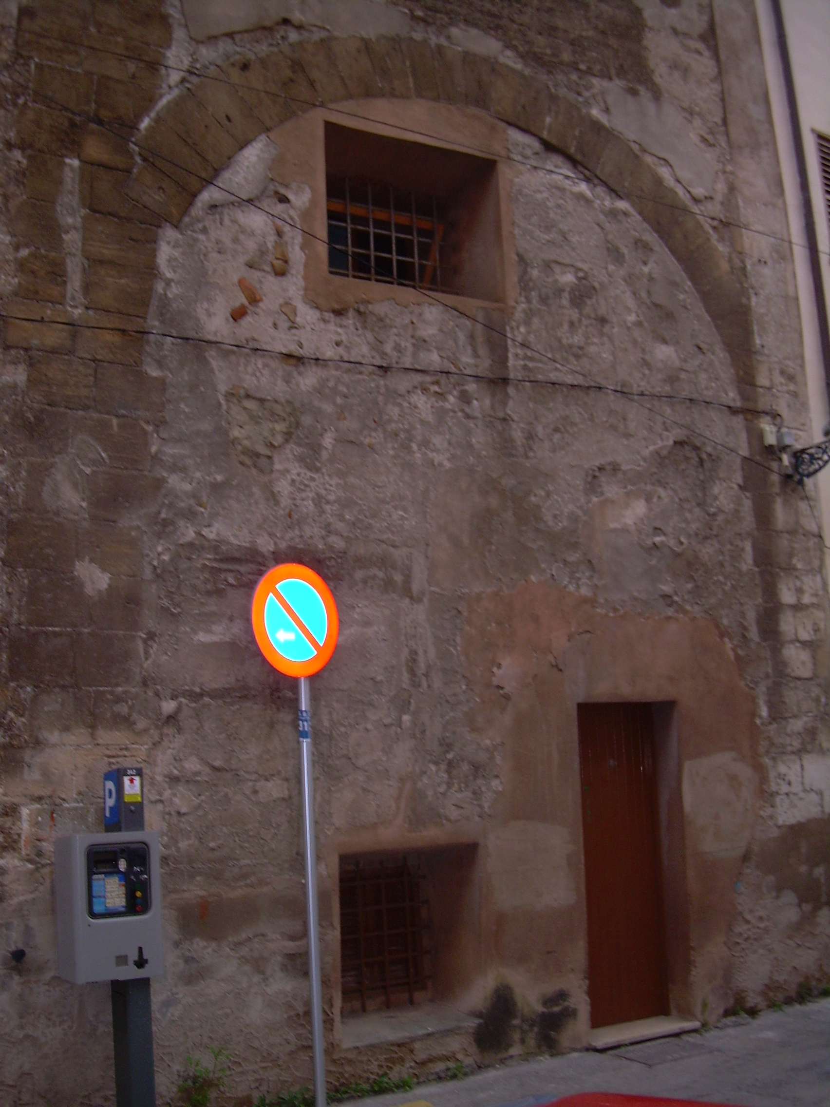 Convent de Santa Teresa. Antiga porta del carrer dels marqueters de l'antiga Medina Mayurqa (Palma musulmana)